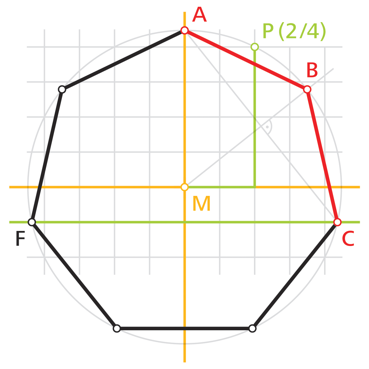 Näherungskonstruktion für ein regelmäßiges Siebeneck, Zeichnung: Volker Plass (Wien)